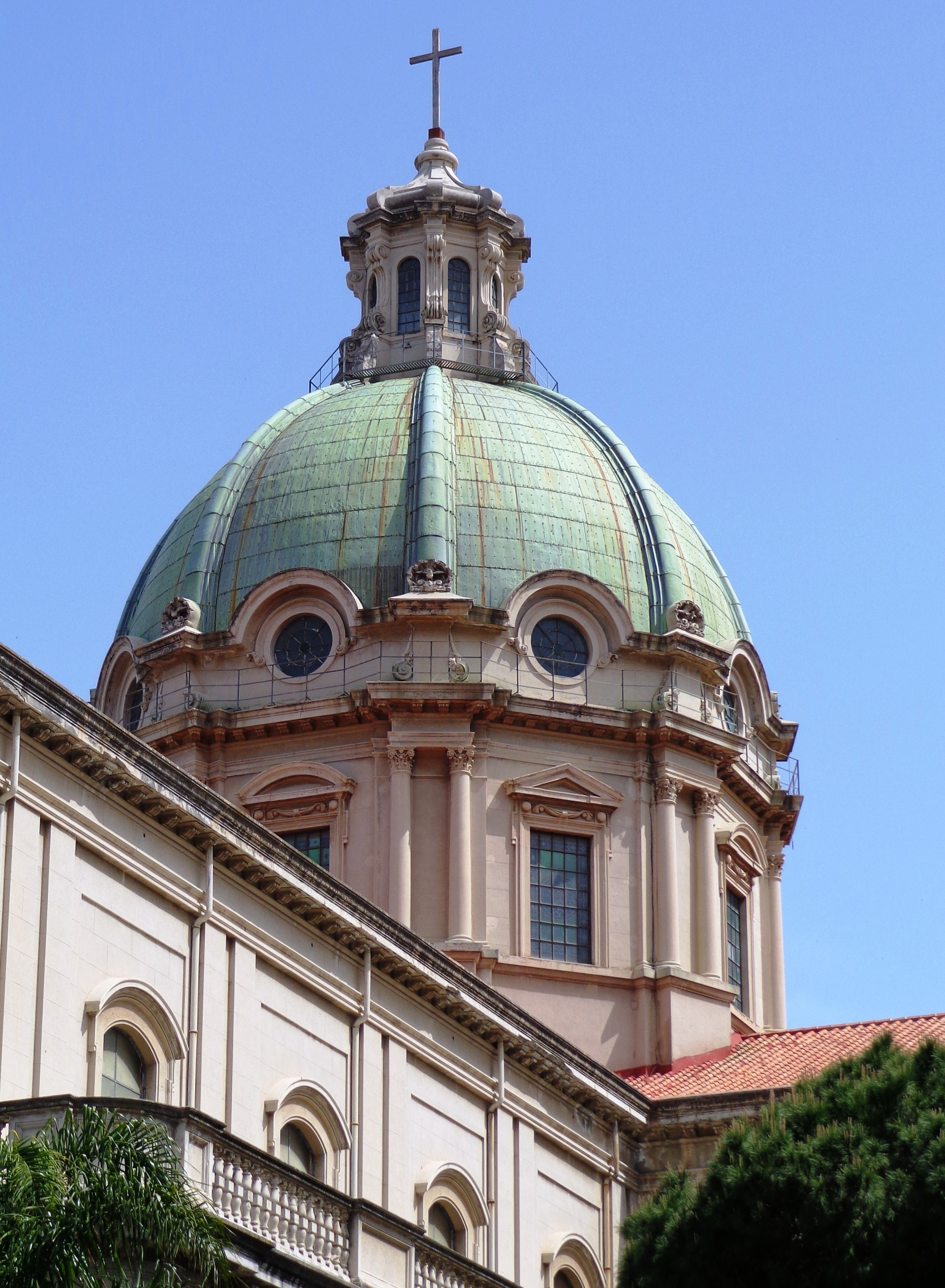 Basilica Minore di San Sebastiano Barcellona Pozzo di Gotto, lato Sud.